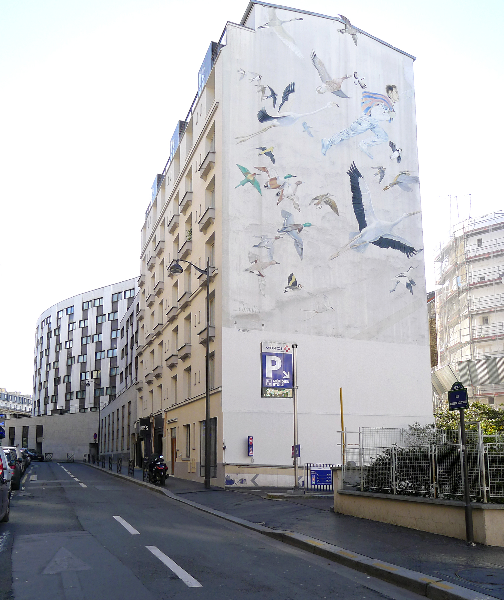 Rue Waldeck-Rousseau - Paris XVII